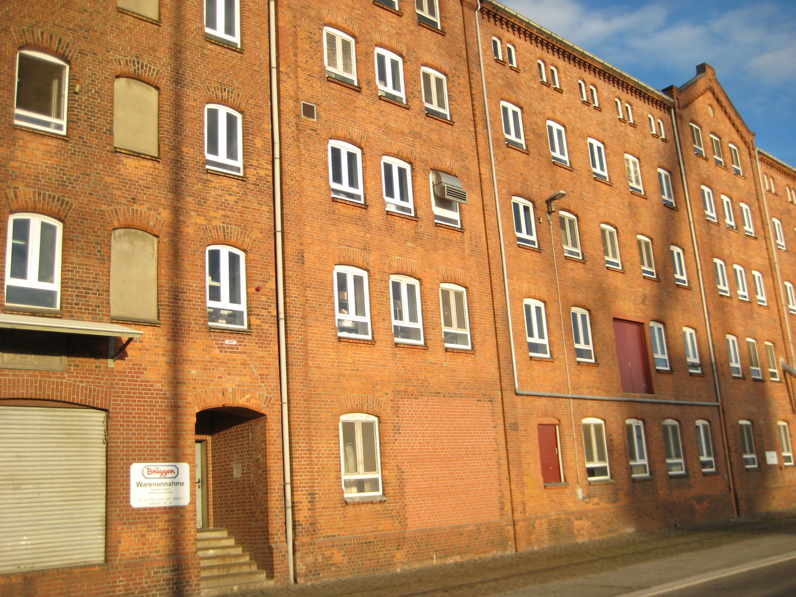 H. & J. Brüggen in Lübeck, Gebäude von 1899 (links) an der Hafenstraße